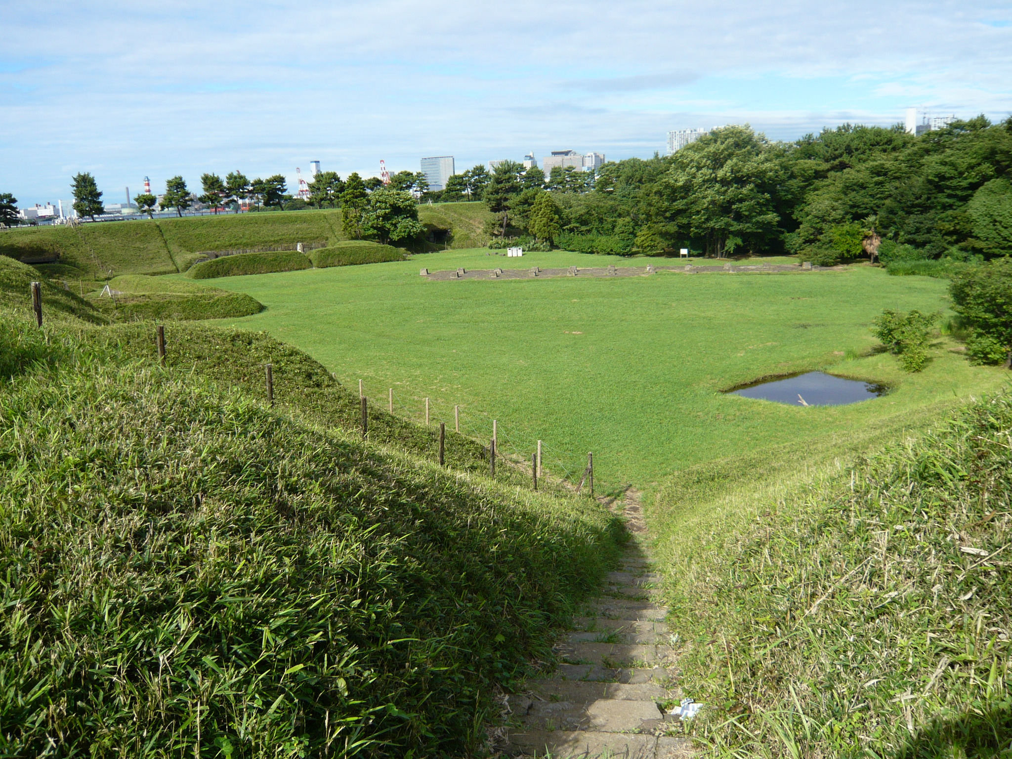 台場公園（東京都港区台場(お台場)） Daiba Park(Daiba-kouen,台場公園) in odaiba,Tokyo,Japan.